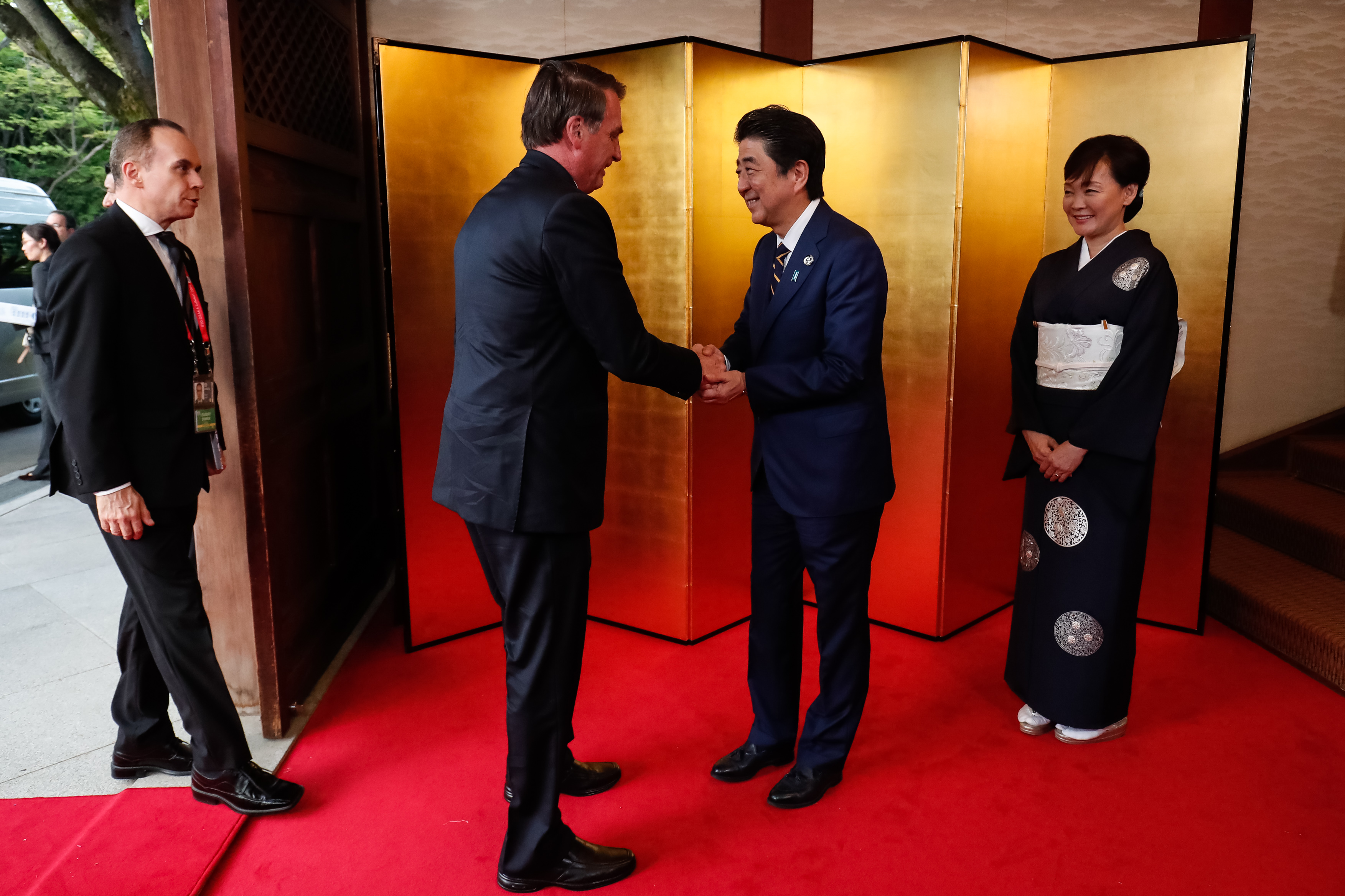 (Osaka - Japão, 28/06/2019) Presidente da República, Jair Bolsonaro, recebe os cumprimentos do Primeiro Ministro Shinzo Abe, na chegada à casa de hospedes do Castelo de Osaka. Foto: Alan Santos / PR